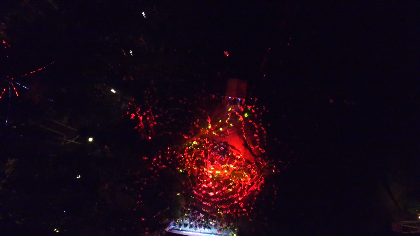 Хоро